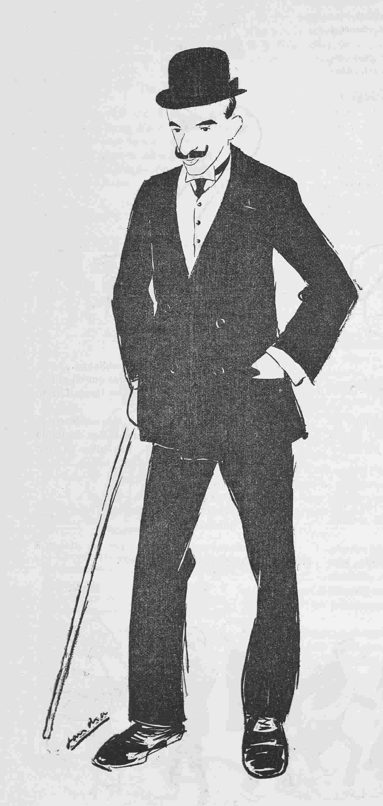 Gregorio Martínez Sierra.